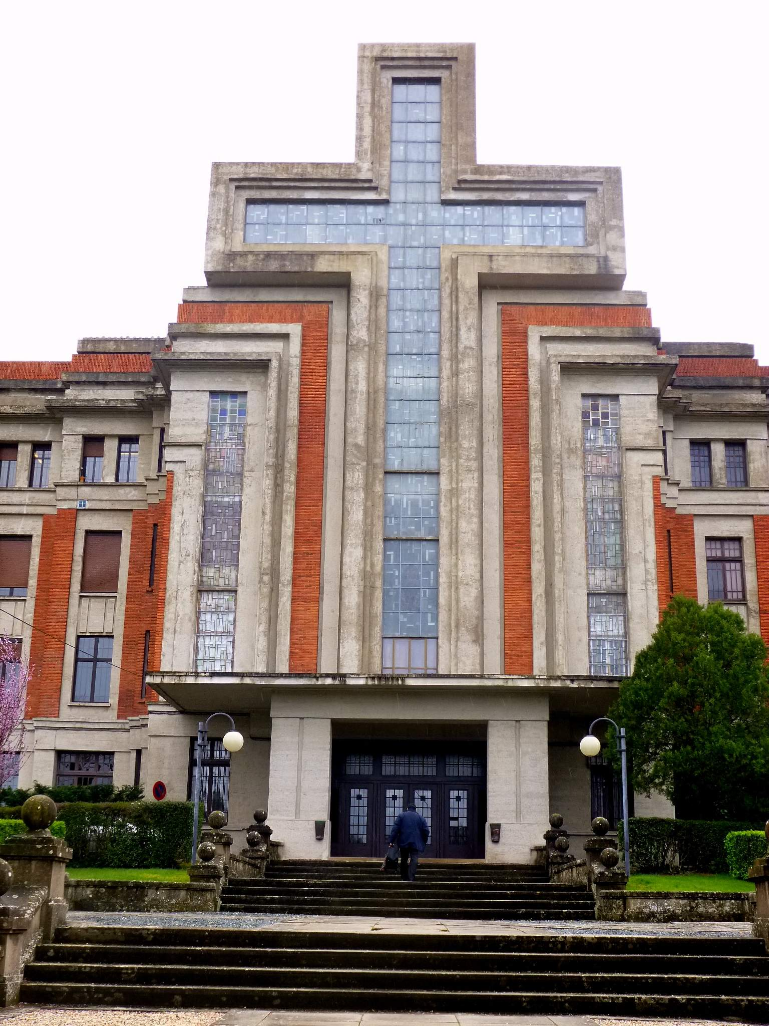 Seminario de Pamplona